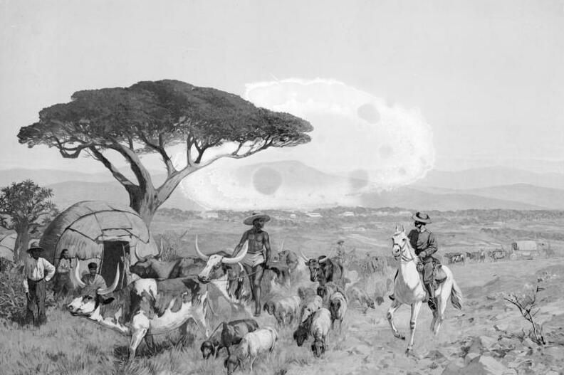 Auf der Steppe bei Windhuk